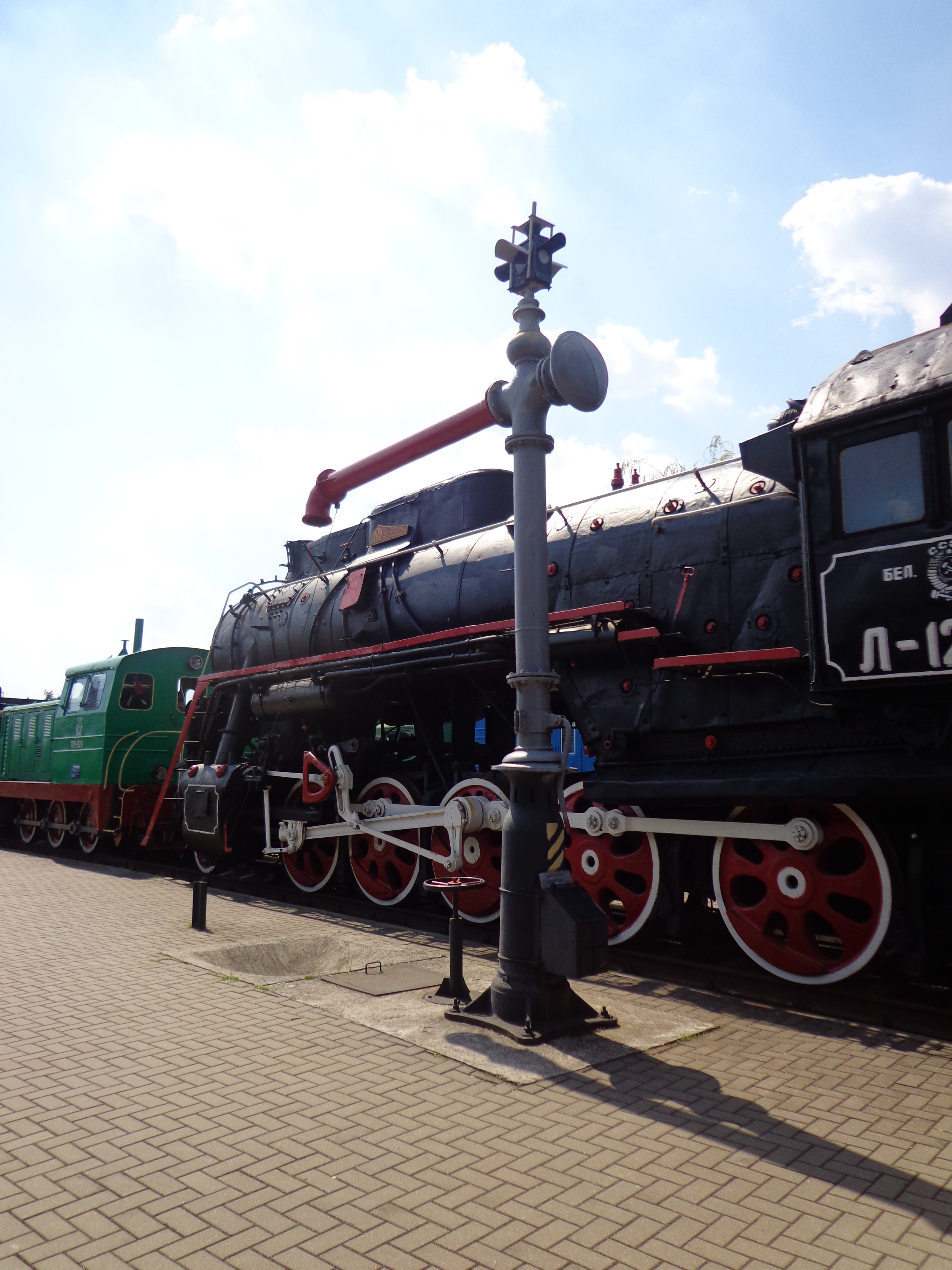 паровозная гидроколонка в экспозиции Брестского железнодорожного музея